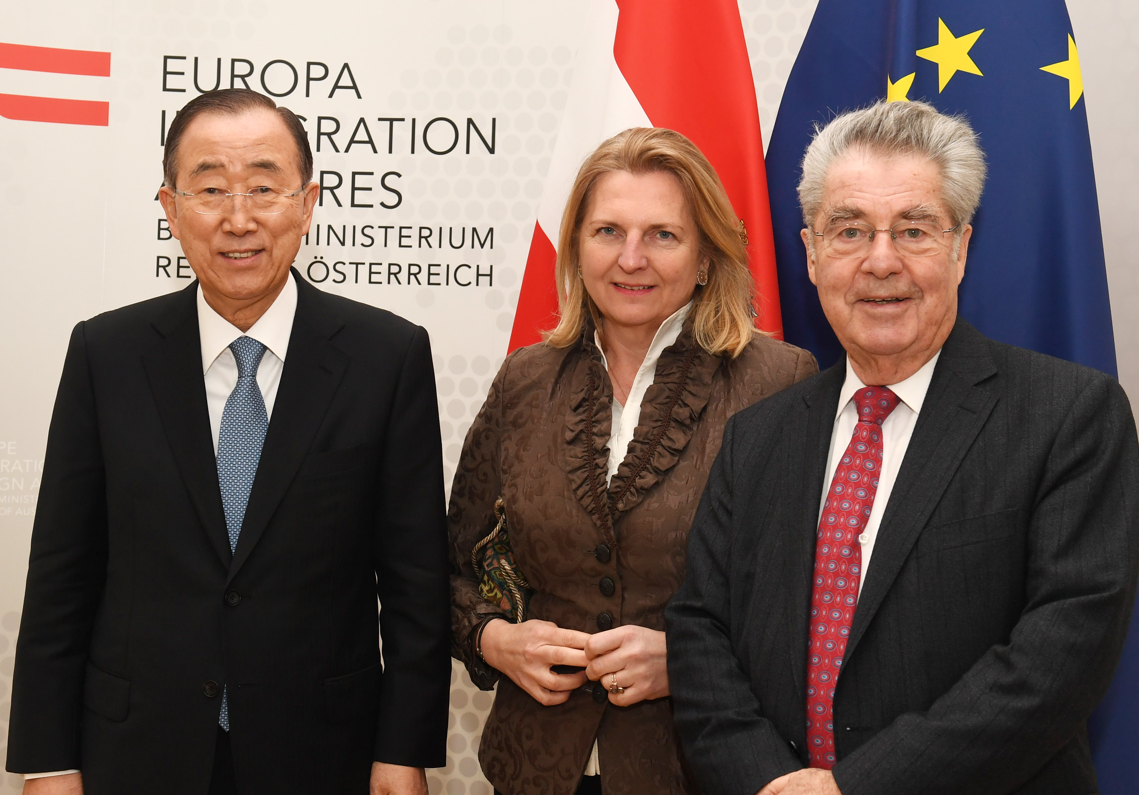 Wien, am 03. Jänner 2018 empfing Außenministerin Dr. Karin Kneissl den ehemaligen UN-Generalsekretär Ban Ki Moon sowie Altbundespräsidenten Dr. Heinz Fischer. Foto: Mahmoud